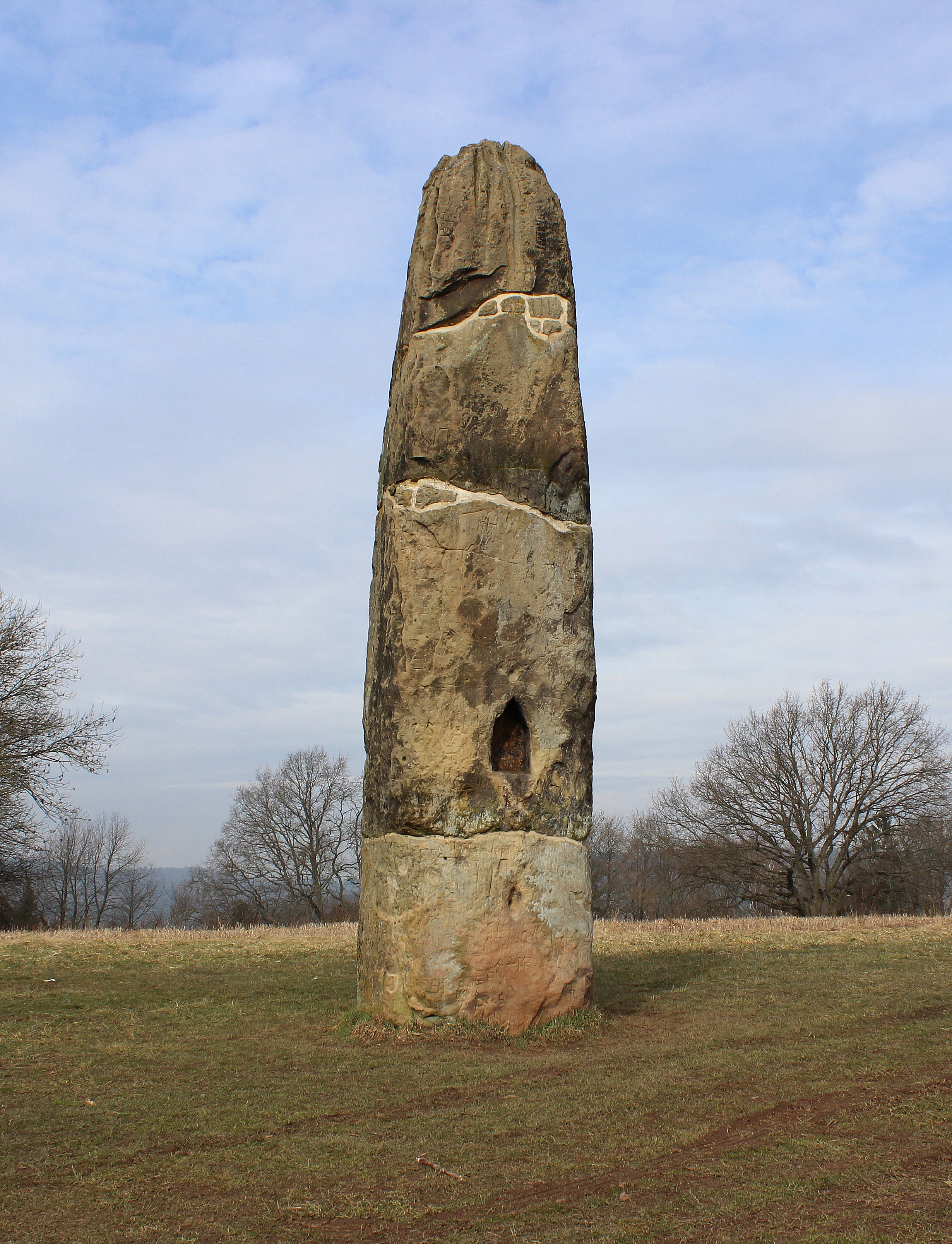 Der Gollenstein bei Blieskastel, Saarland